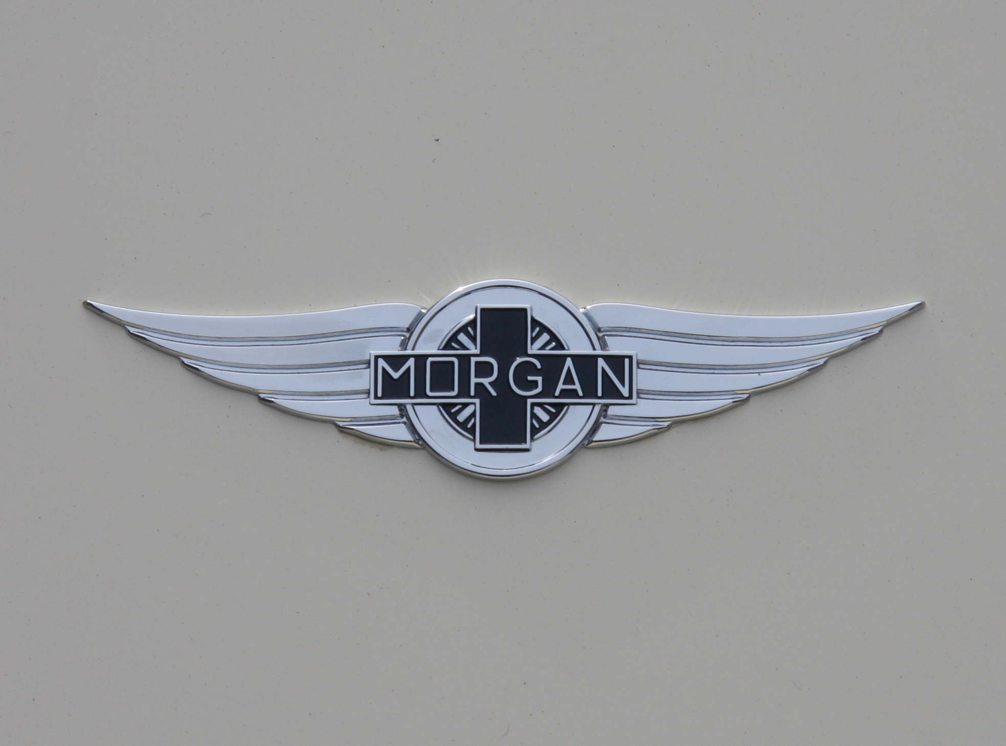 Morgan badge